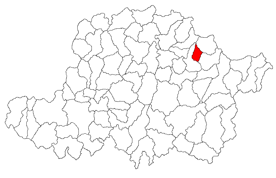 Categorie:Hărţi ale judeţului Arad